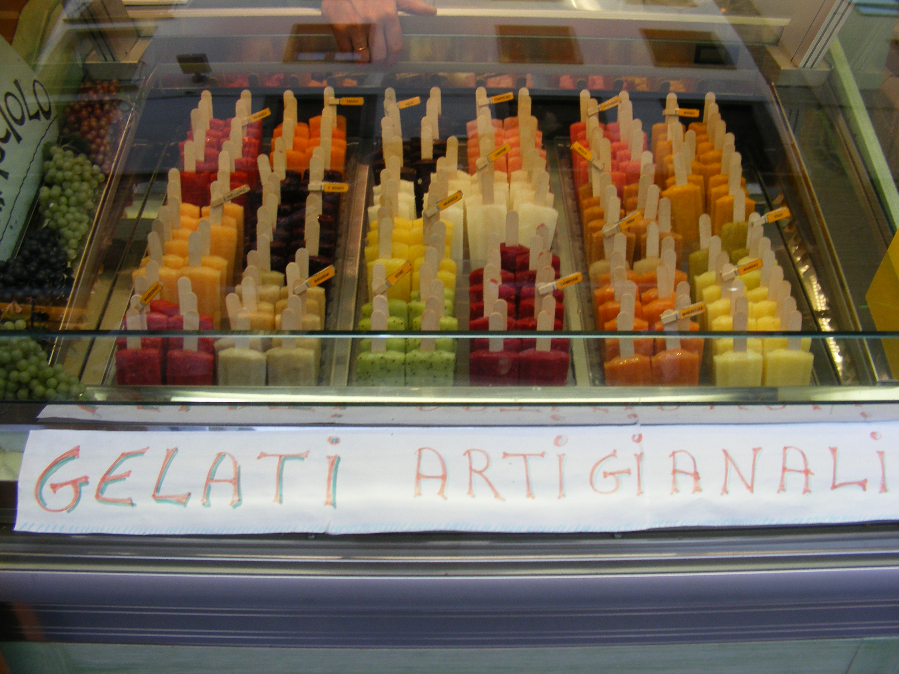 Firenze - Gelati artigianali.